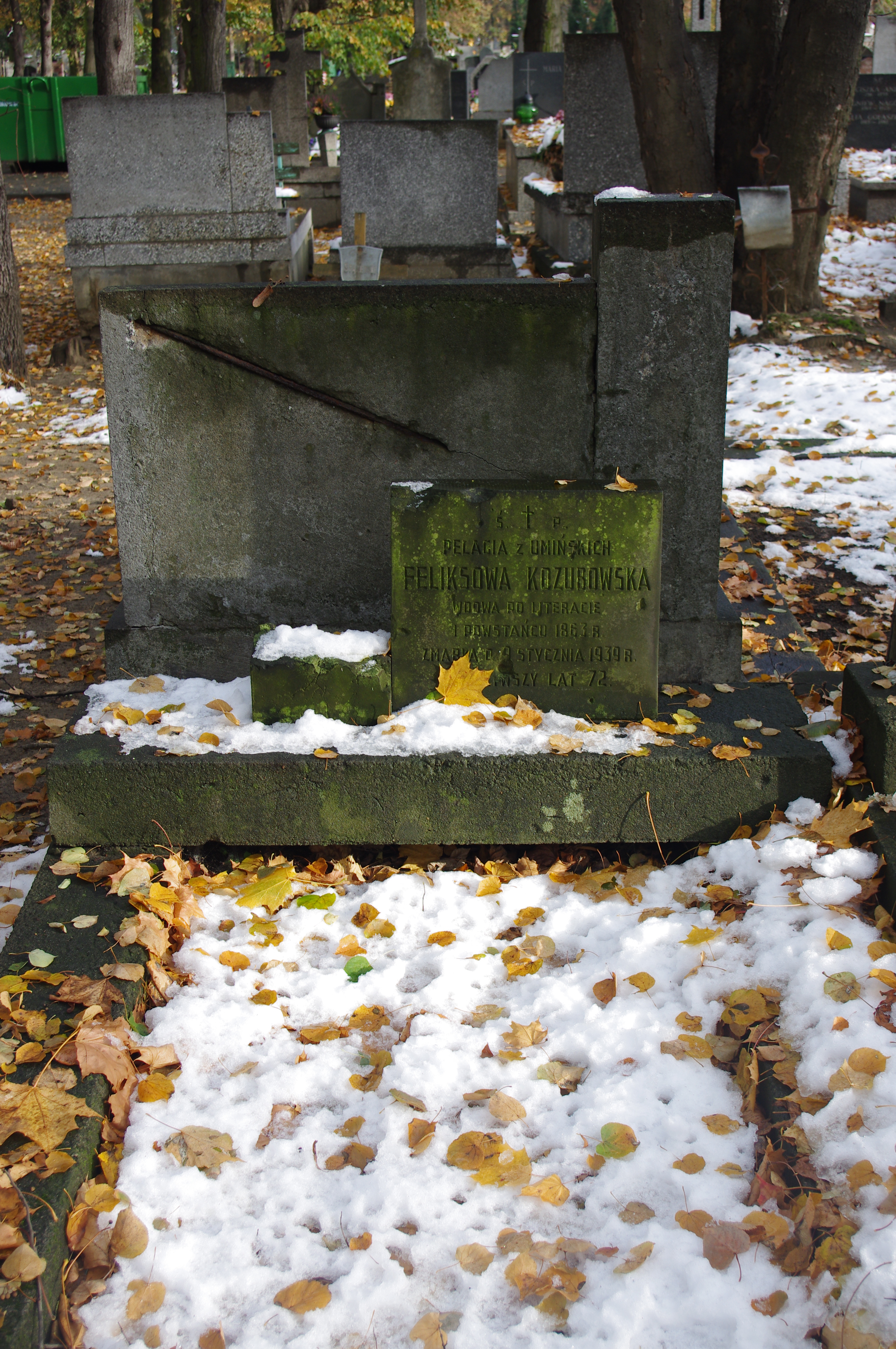 Grób Pelagii Kozubowskiej z domu Umińskiej, wdowy po pisarzu i powstańcu styczniowym Feliksie Kozubowskim na Cmentarzu Bródnowskim w Warszawie